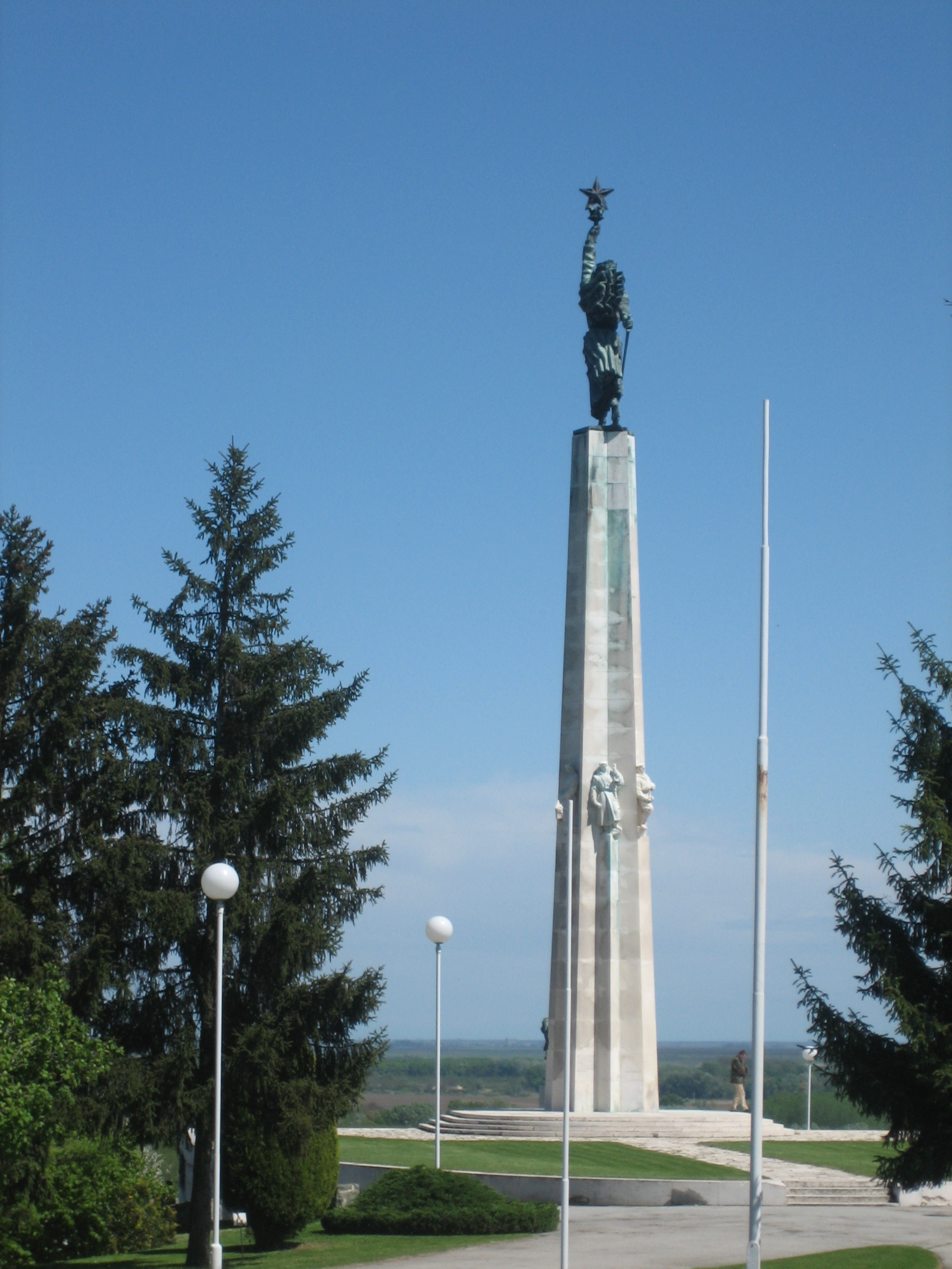 A. Augustinčić, Monument to the Battle of Batina (Batina, Croatia) / A. Augustinčić, Spomenik Batinskoj bitci (Batina).